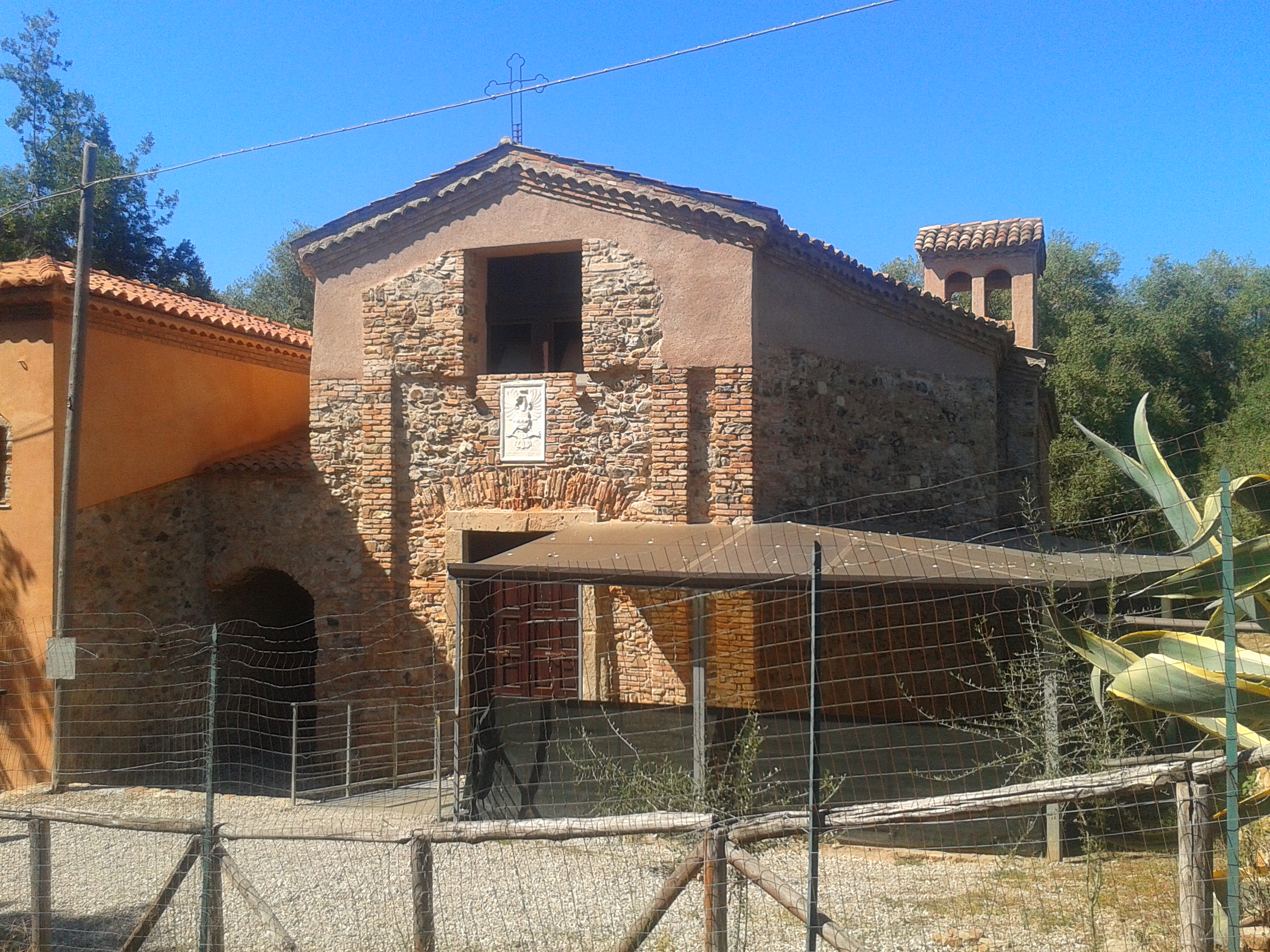 Tempio di San Fantino, ubicato a Palmi nel quartiere di Taureana.